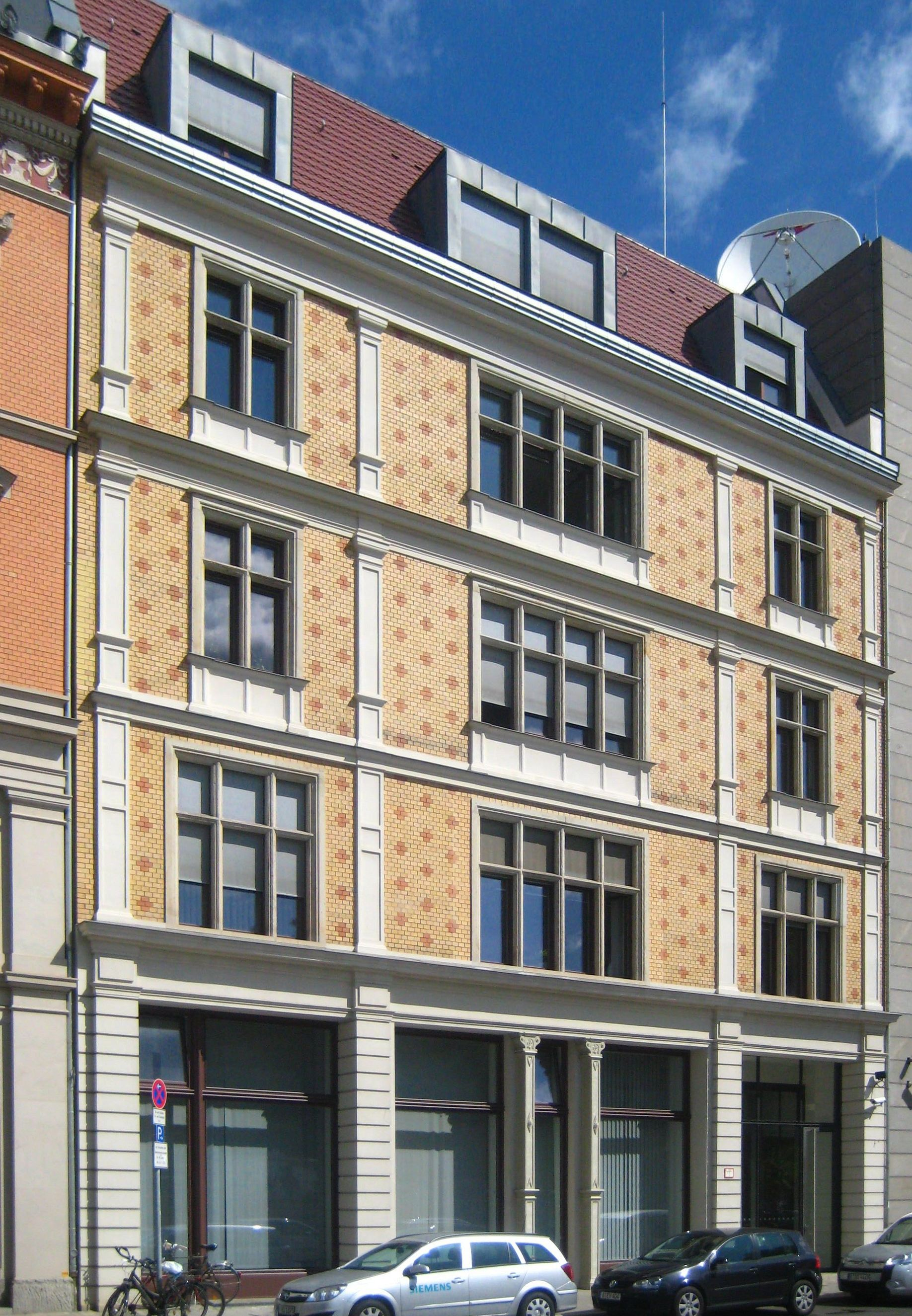 Ehemaliges Hotel Prinz Heinrich in der Dorotheenstraße 84 (früher 28, 22 bzw. 82) in Berlin-Mitte, heute Teil des Presse- und Informationsamts der Bundesregierung. Das Hotel wurde 1887 für den Eisenbahn-Unternehmer Damm errichtet. 1925 wurde es in den 1913-1917 errichteten Komplex des Postscheckamtes integriert. Seit dem Umbau des Postscheckamtes in den 1990er-Jahren gehört das frühere Hotel zum Presse- und Informationsamt der Bundesregierung. Als Teil des Bauensembles Postscheckamt ist es denkmalgeschützt.